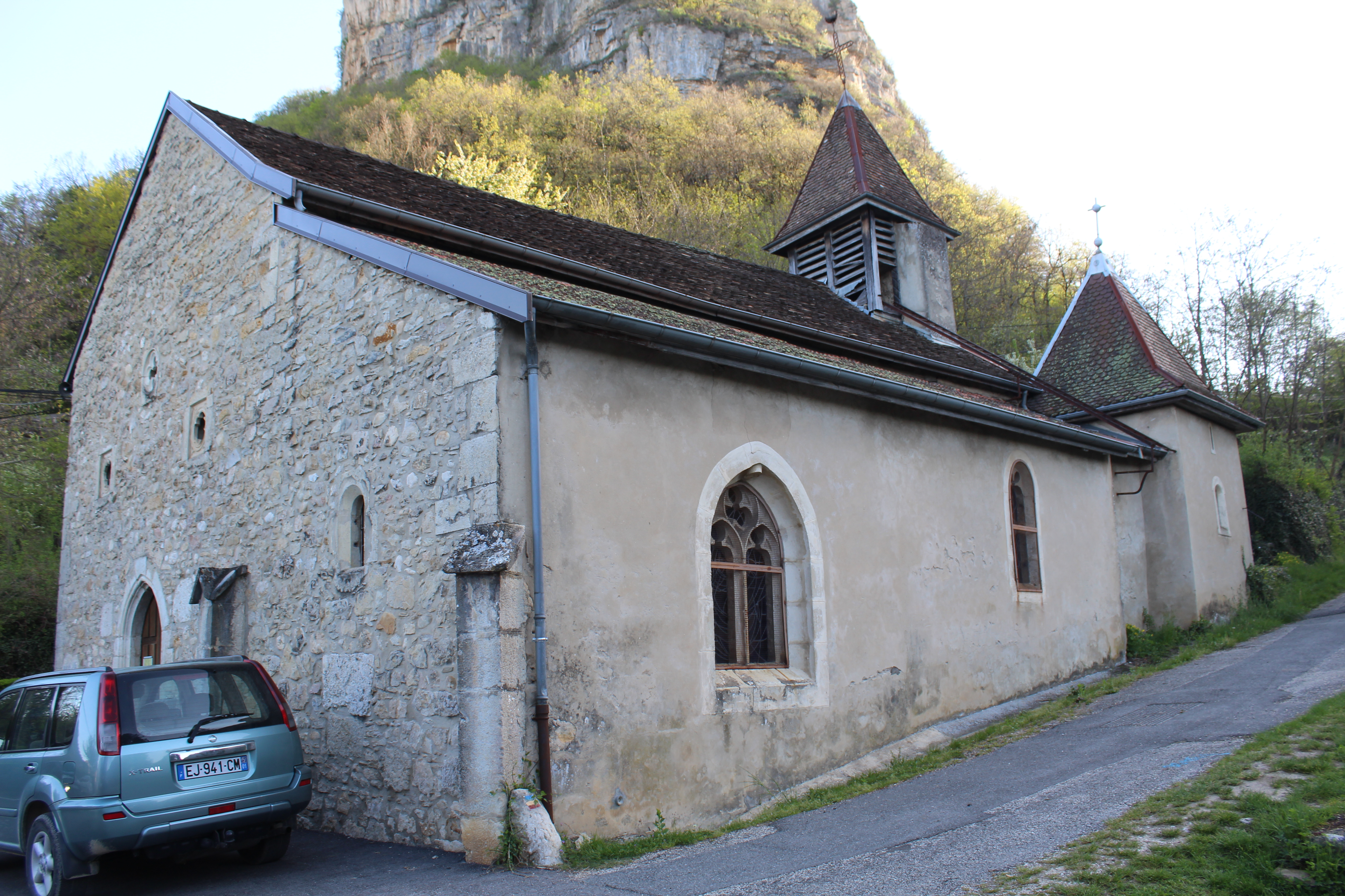 Église Saint-Pierre de Serrières-de-Briord.